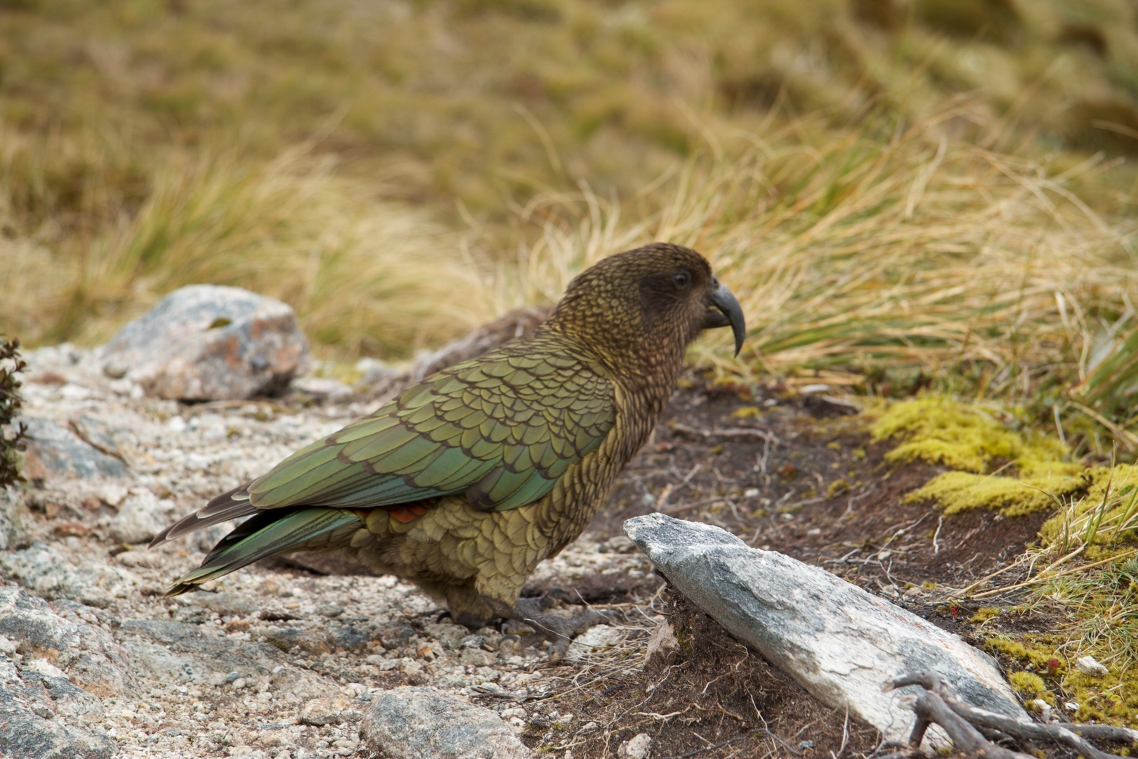 Māori: Kea